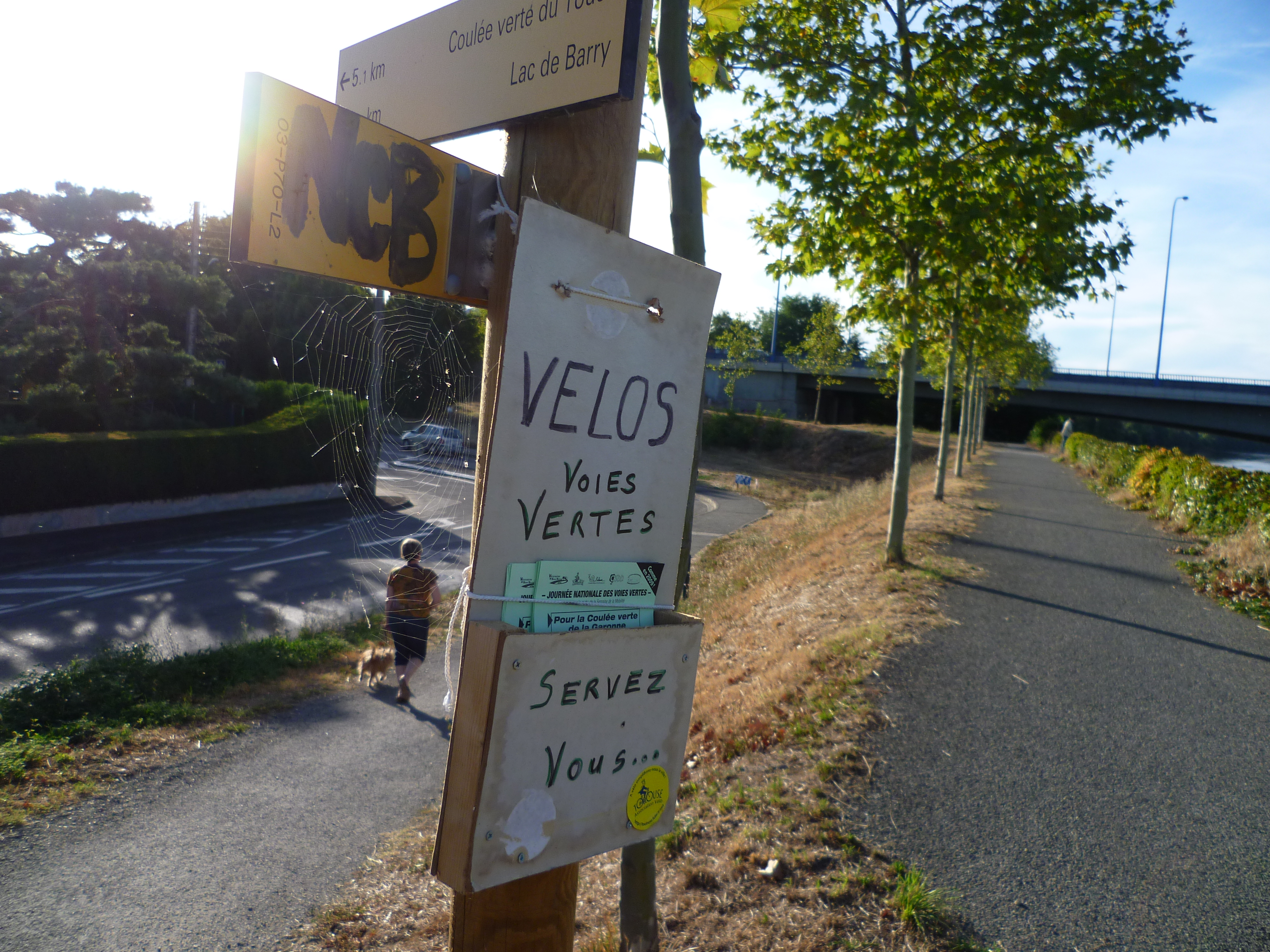 Le GR 86 au bord de la Garonne à Toulouse.